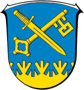 Wappen von Aarbergen